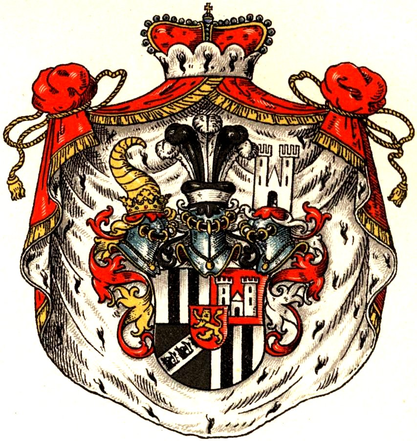 Wappen der Familie Fürsten zu Sayn-Wittgenstein.